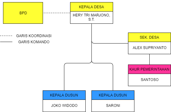 Struktur Organisasi Pemerintahan Desa Sekaran